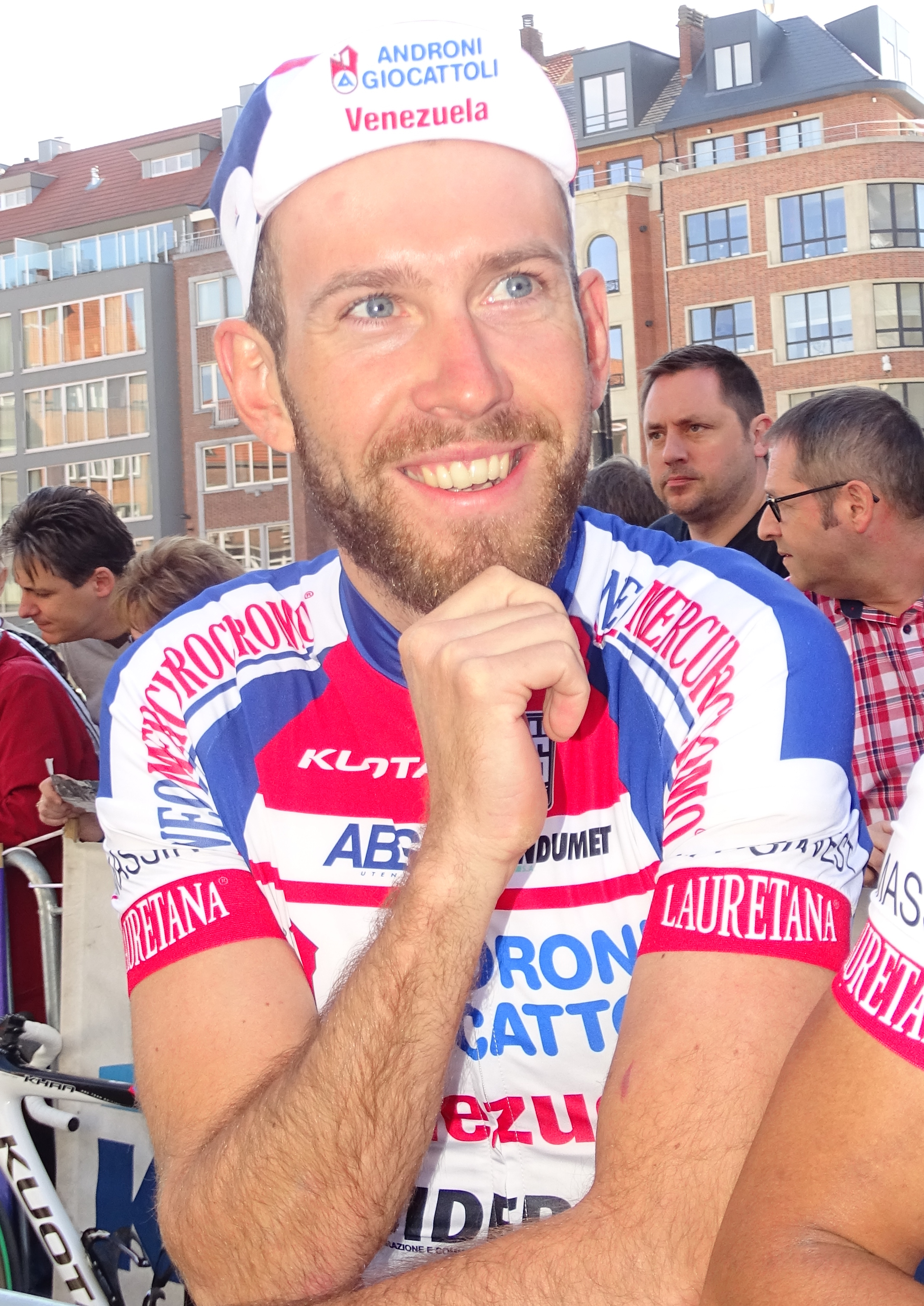 Reportage réalisé le mercredi 15 avril à l'occasion du départ de la Flèche brabançonne 2015 à Louvain, Belgique.